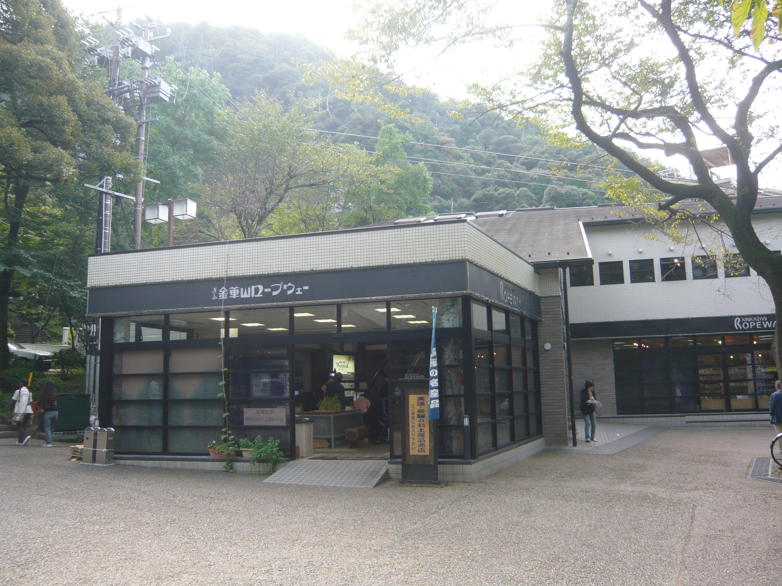 Mt.Kinka Ropeway 乗り場（金華山ロープウェー）,Gifu,Gifu,Japan（岐阜県岐阜市）で撮影。